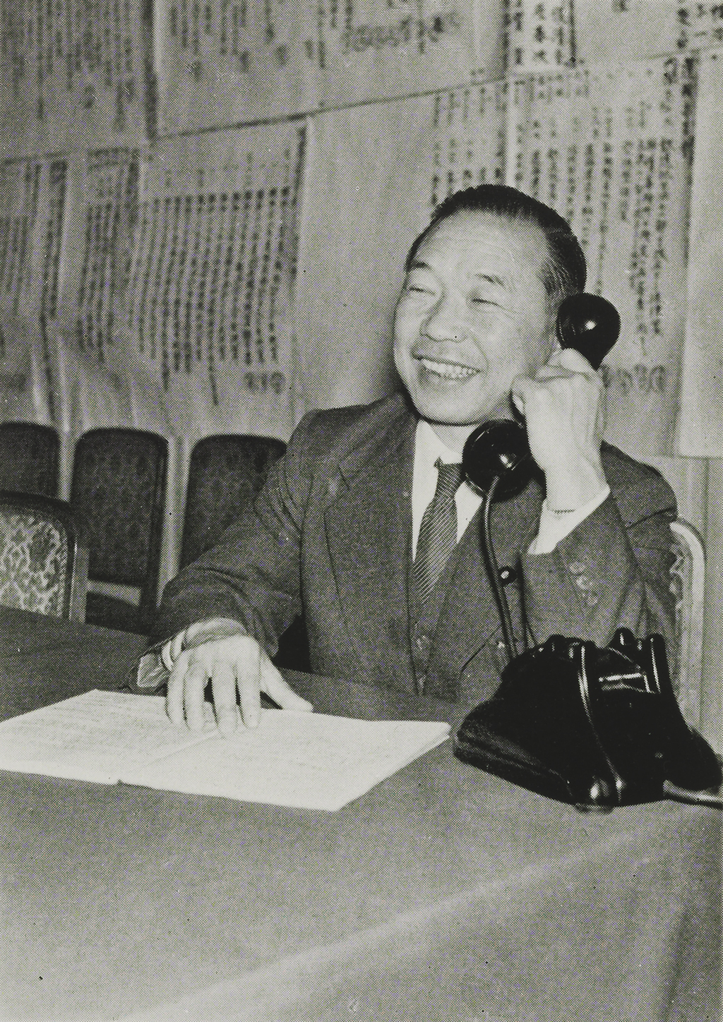 Portrait of Sasaki Kozo (佐々木更三, 1901 – 1985)